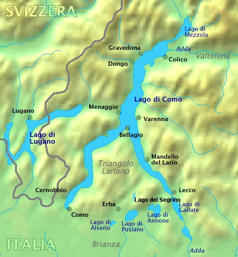 mappa triangolo larino con Lago del Segrino